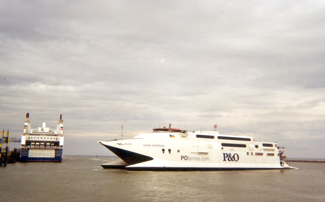 Arrivée à Ouistreham (14) du Max Mols (Caen Express) en provenance de Portsmouth (GB) (unidentified ship at quay)